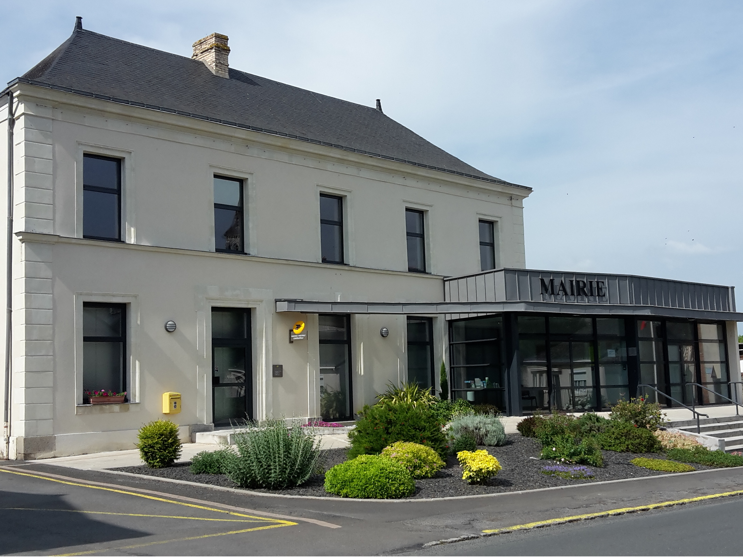 La mairie de Loiré, Maine-et-Loire, France.